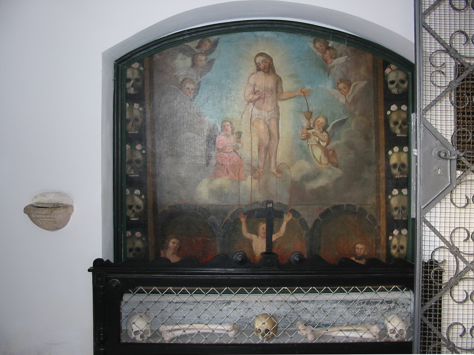 Landshut, Frauenberg 14. Katholische Kirche St. Mariä Heimsuchung. Allerseelenaltar im Vorzeichen der Kirche. Darunter sind in einem Schrein drei Totenschädel und mehrere Beinknochen aufbewahrt.